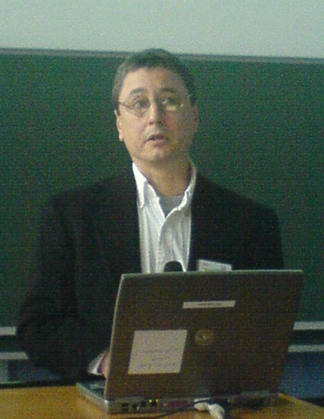 Peter Suber in Golm bei Potsdam